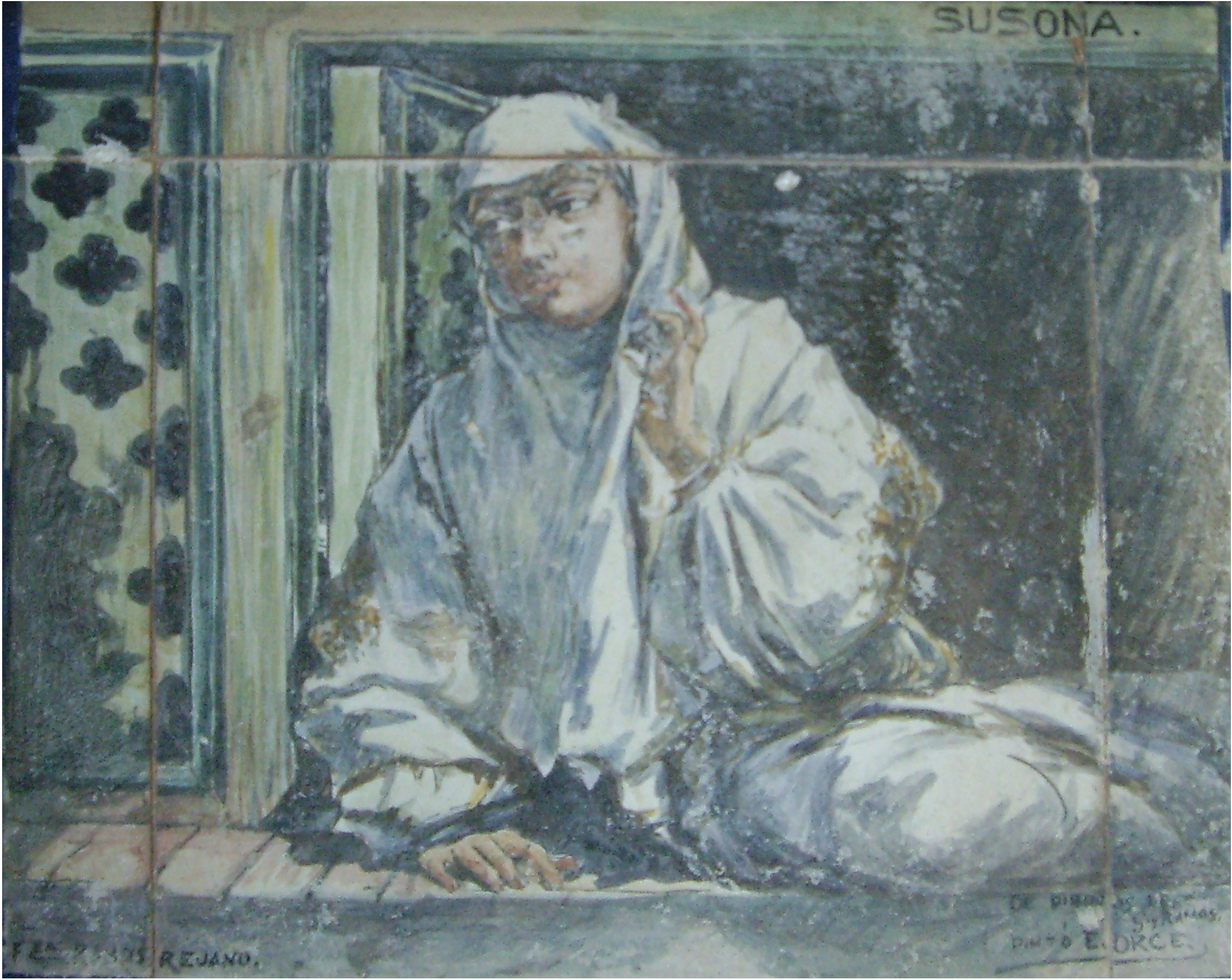 La Bella Susona, en un azulejo de una glorieta del Parque de María Luisa de Sevilla, en España. El azulejo está basado en un cuadro de José García Ramos y está dibujado por Enrique Orcel en la Fábrica de Manuel Ramos Rejano.